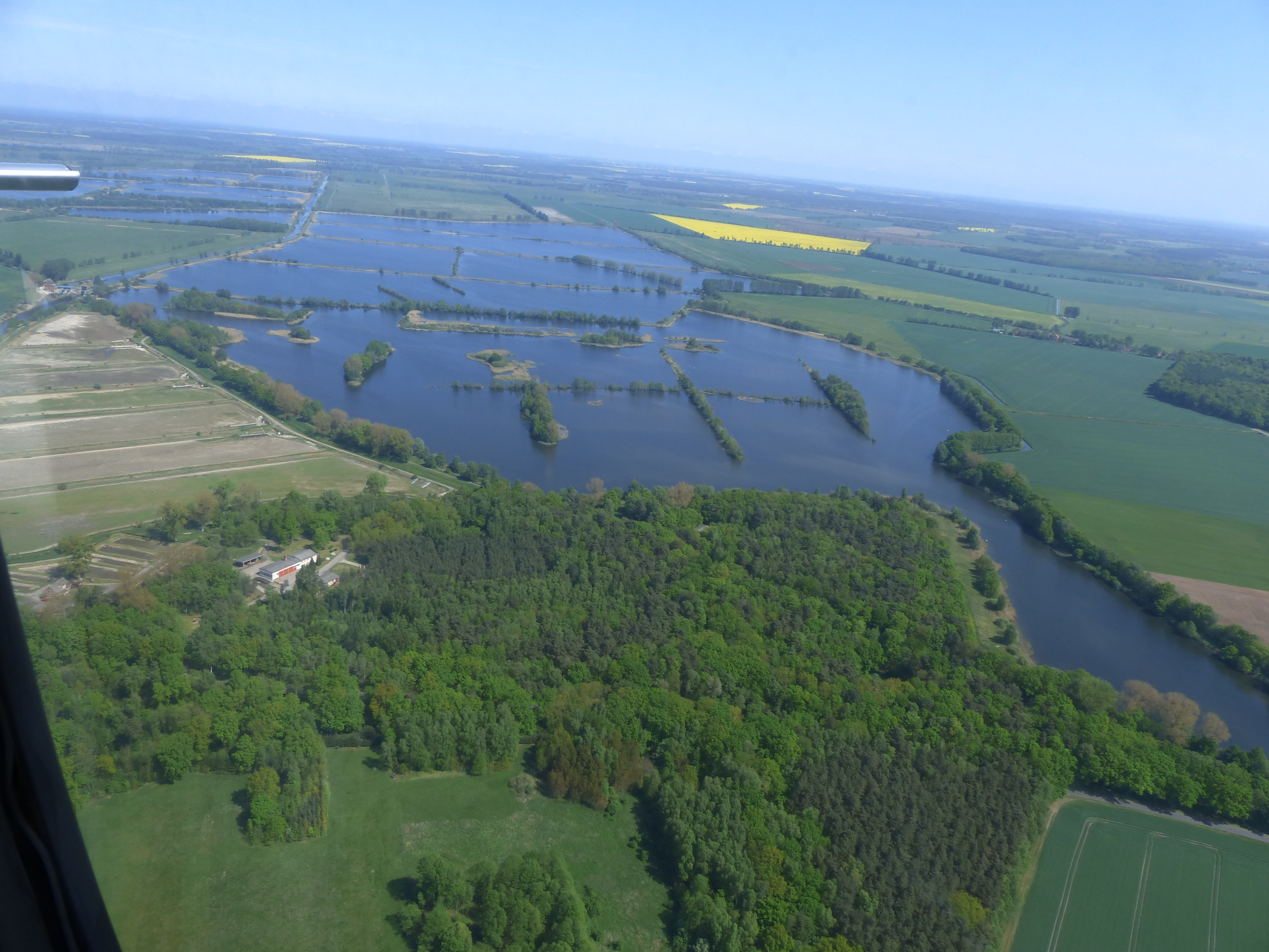 Luftaufnahme der Lewitz